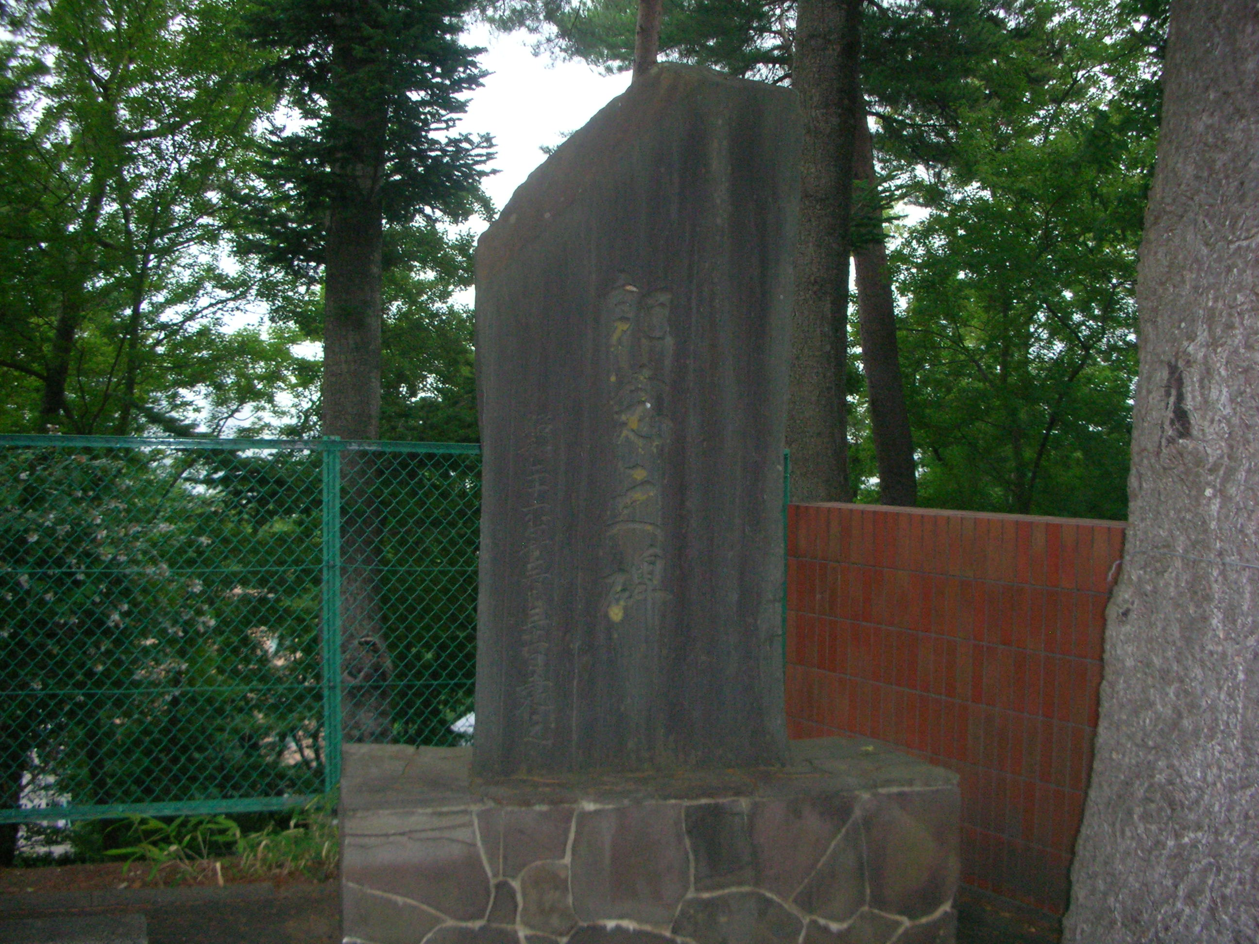 仙台電波高等学校車回しの記念碑